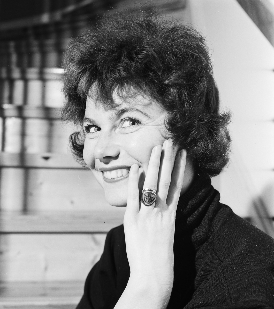 Torhild Lindal var en norsk sangstjerne fra Fredrikstad, også kjent skuespiller fra musikaler og enkelte filmer.